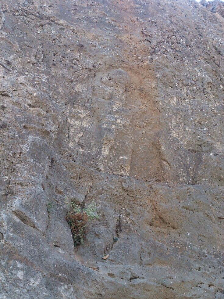 نقش برجسه بهرام دوم در حال نیایش